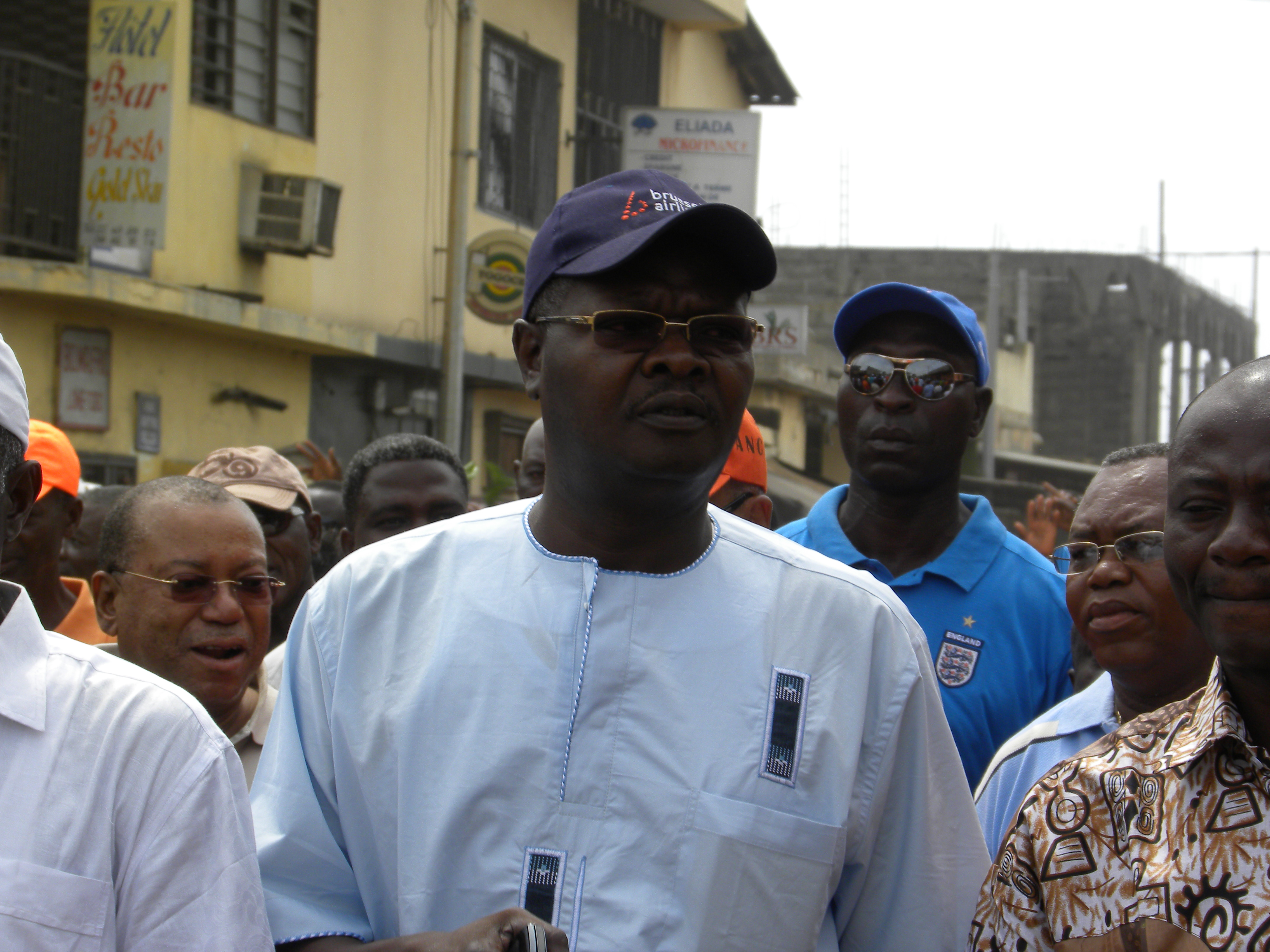 Agbeyomé Kodjo (juin 2012, Lomé) photo de la VOA, confirmée par le texte en bas à droite de l'image